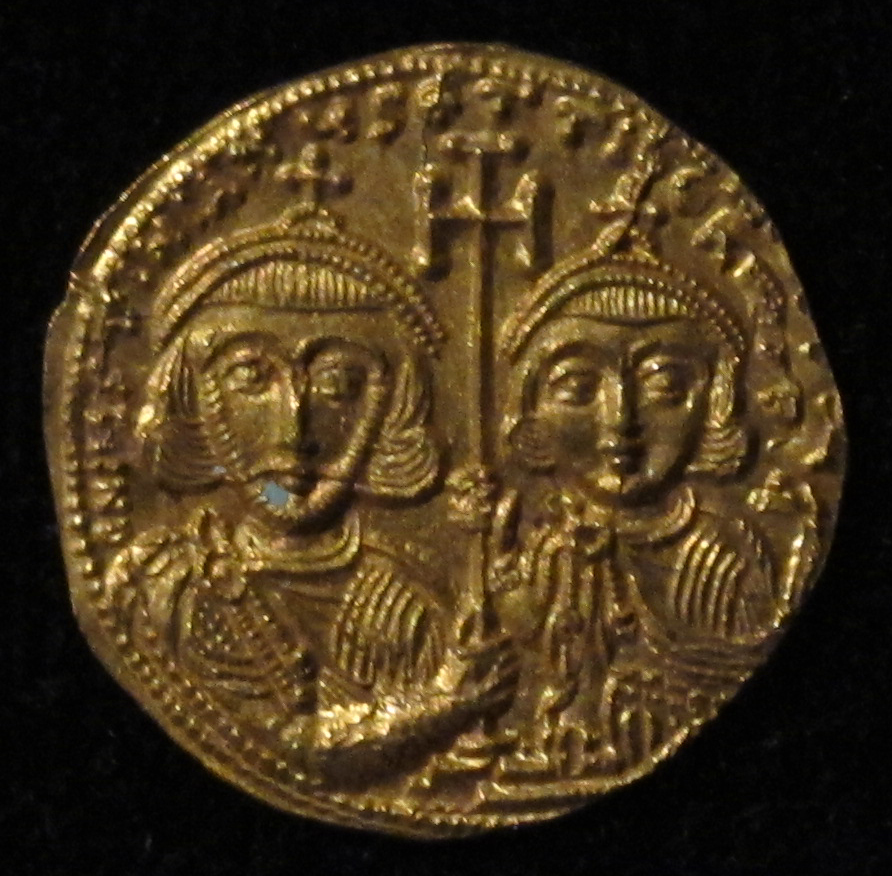 Monete d'oro di giustiniano II e tiberio IV, 705-711, 02, 5